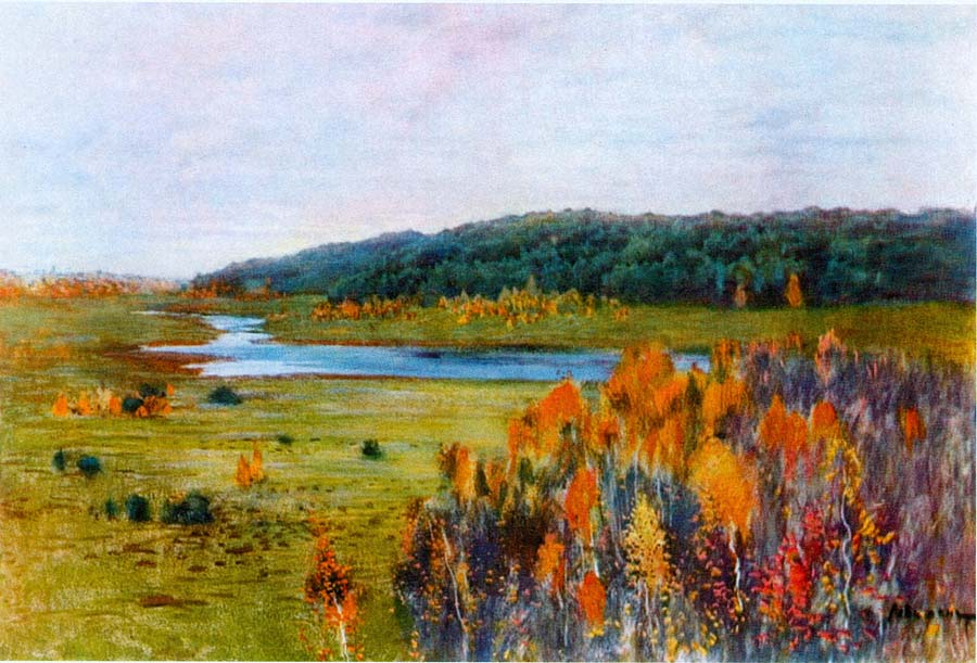 Картина русского пейзажиста Исаака Ильича Левитана "Долина реки" (Пастель).